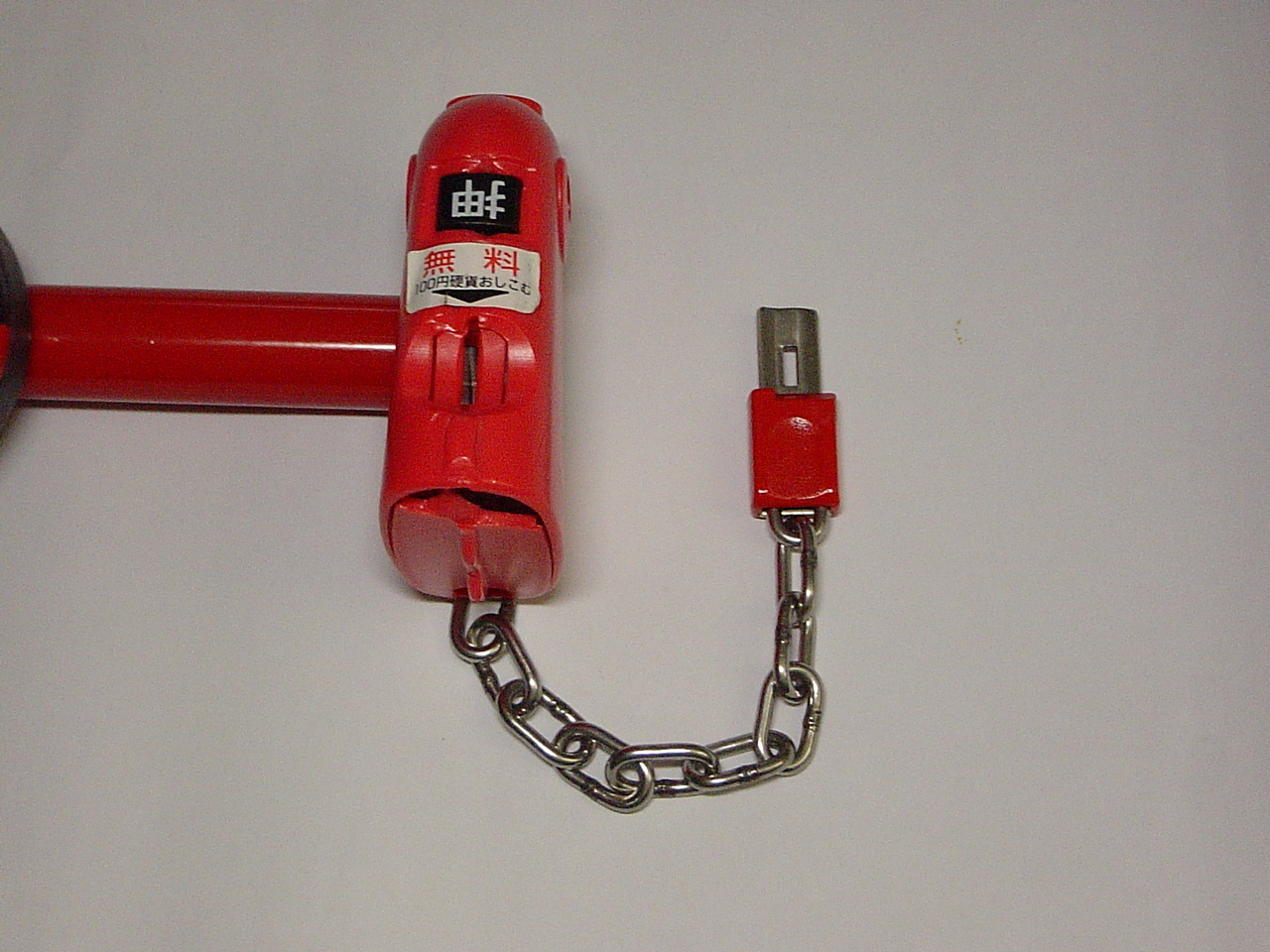 Pfandschloss 2